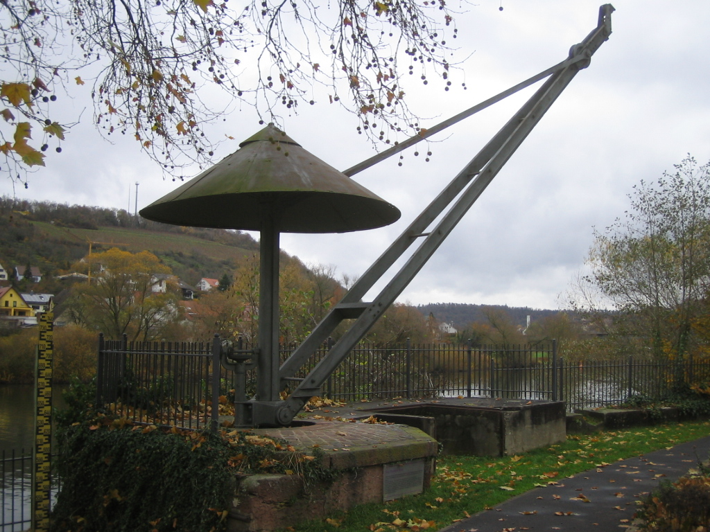 Der Packhof-Kran wurde 1896 nach einem Entwurf der Maschinenfabrik Gebrüder Unger aus Wertheim gebaut. Er hatte eine Tragfähigkeit von 5 Tonnen und eine Ausladung von 6 Metern und diente zum Be- und Entladen der Mainschiffe. Seinen Namen erhielt der Kran nach dem in der Nähe befindlichen landwirtschaftlichen Lagerhaus, das 1974 abgerissen wurde. Dieses Gebäude war 1798 als „Löwensteiner Hof“ errichtet und später zum „Packhof“ vor dem Vaitstor umgebaut worden, bevor es zum Lagerhaus wurde (Infotafel am Packhof-Kran). Der Packhof-Kran befindet sich an der Tauberpromenade im Wertheim am Main.